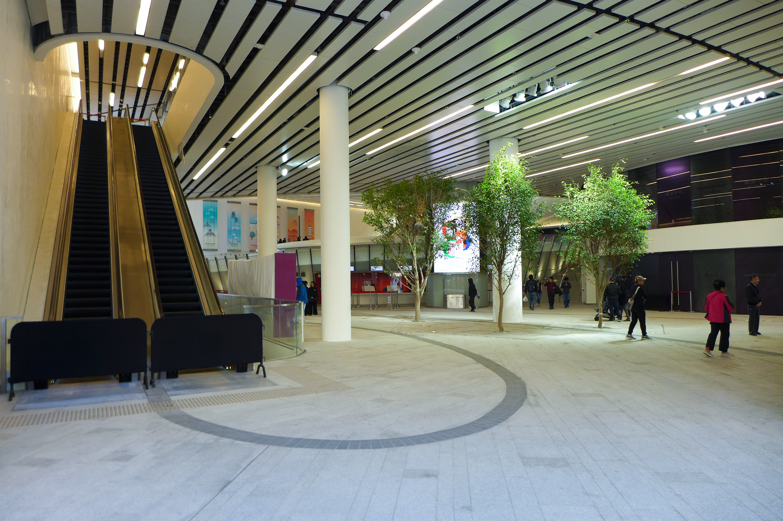 Xiqu Centre